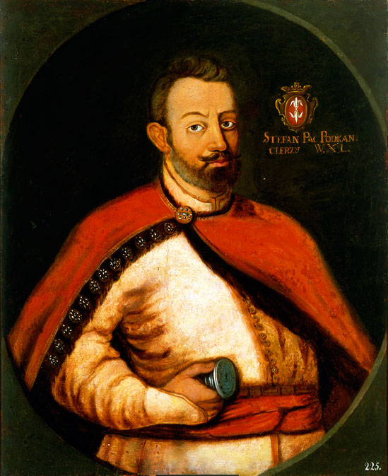 Беларуская (тарашкевіца): Партрэт Стэфана Паца (1587–1640)